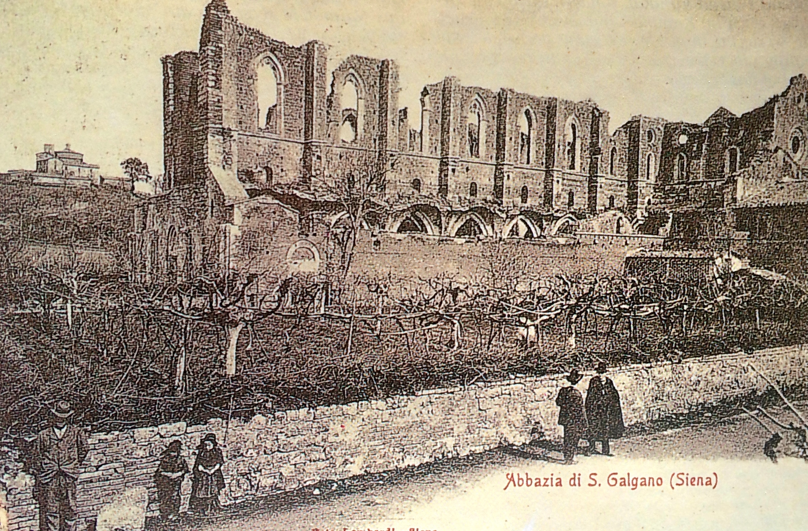 Historischen Ansicht der Abbazia San Galgano